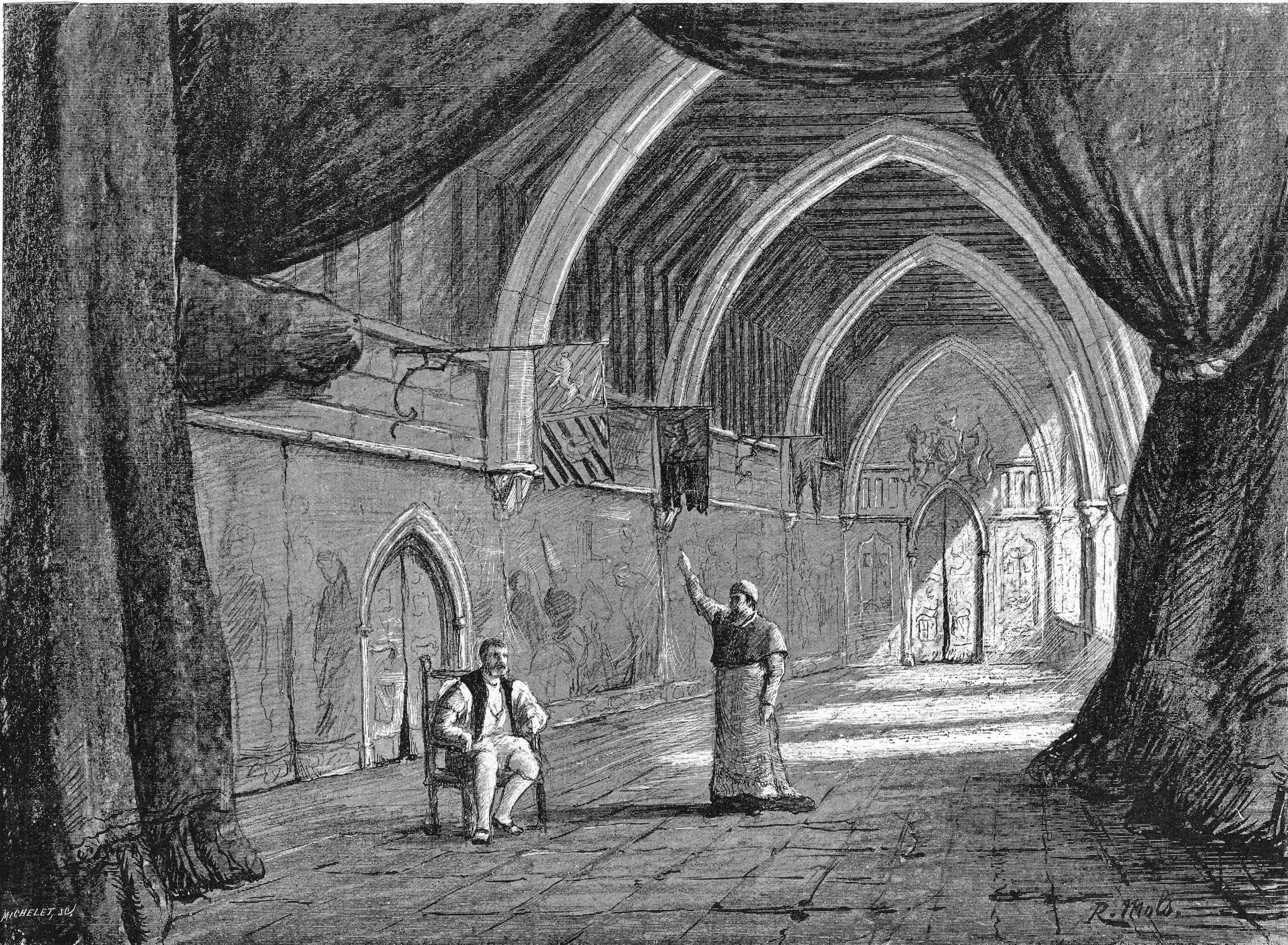 Saint-Saëns - Henry VIII - L'appartement du roi, 3e acte, 1er tableau - Mols, Michelet 1883